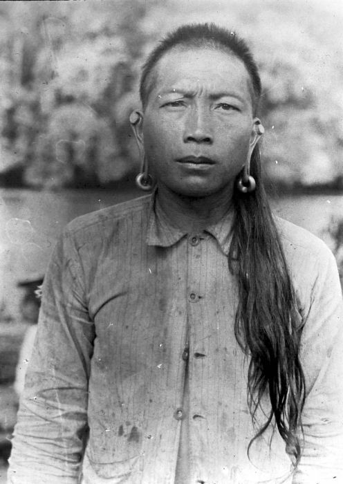 Repronegatief. Deze foto is gemaakt tijdens de Midden-Oost-Borneo Expeditie van 1925.. Een Kayan-Dajak, Midden-Oost-Borneo